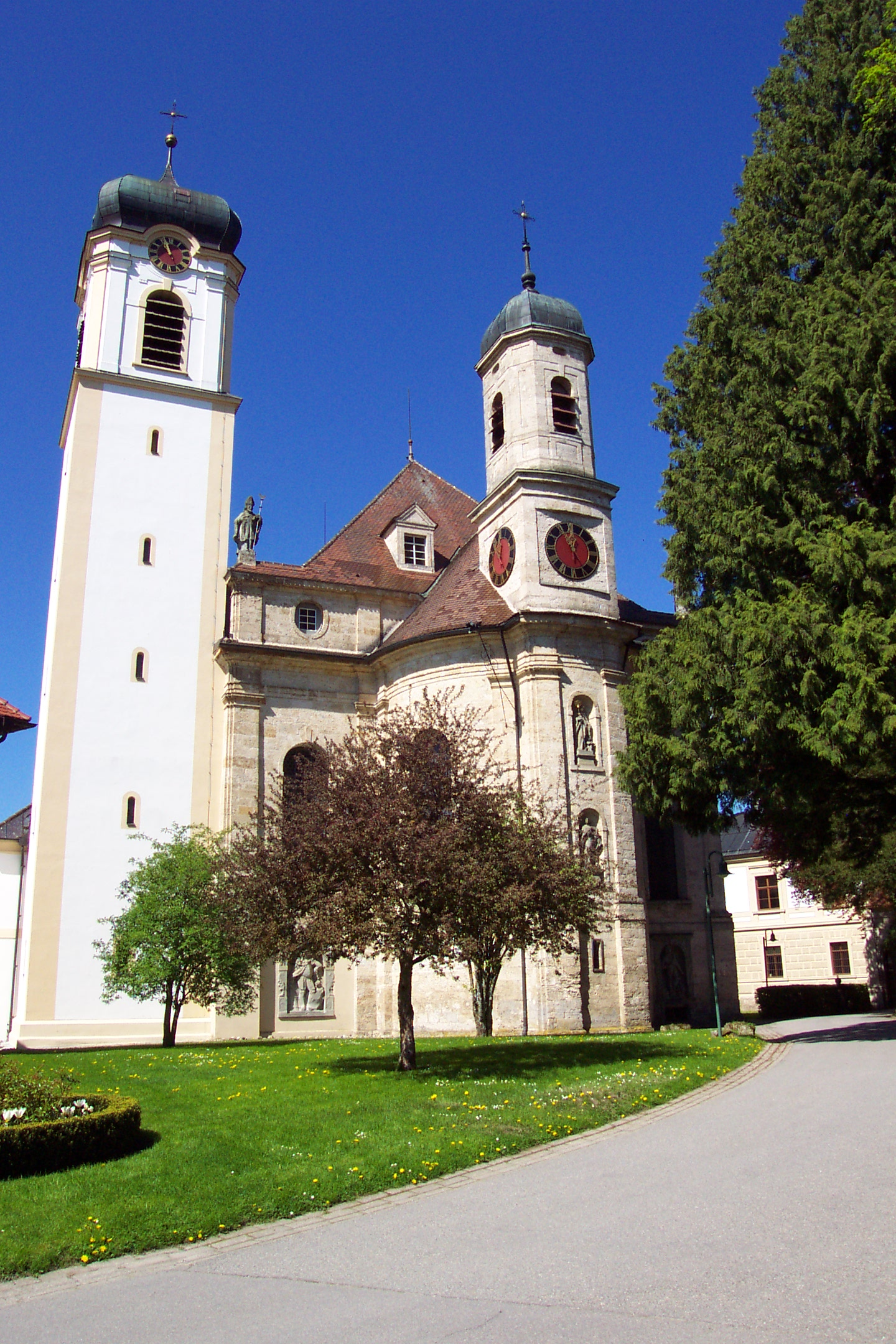 Schlosskirche in Wolfegg